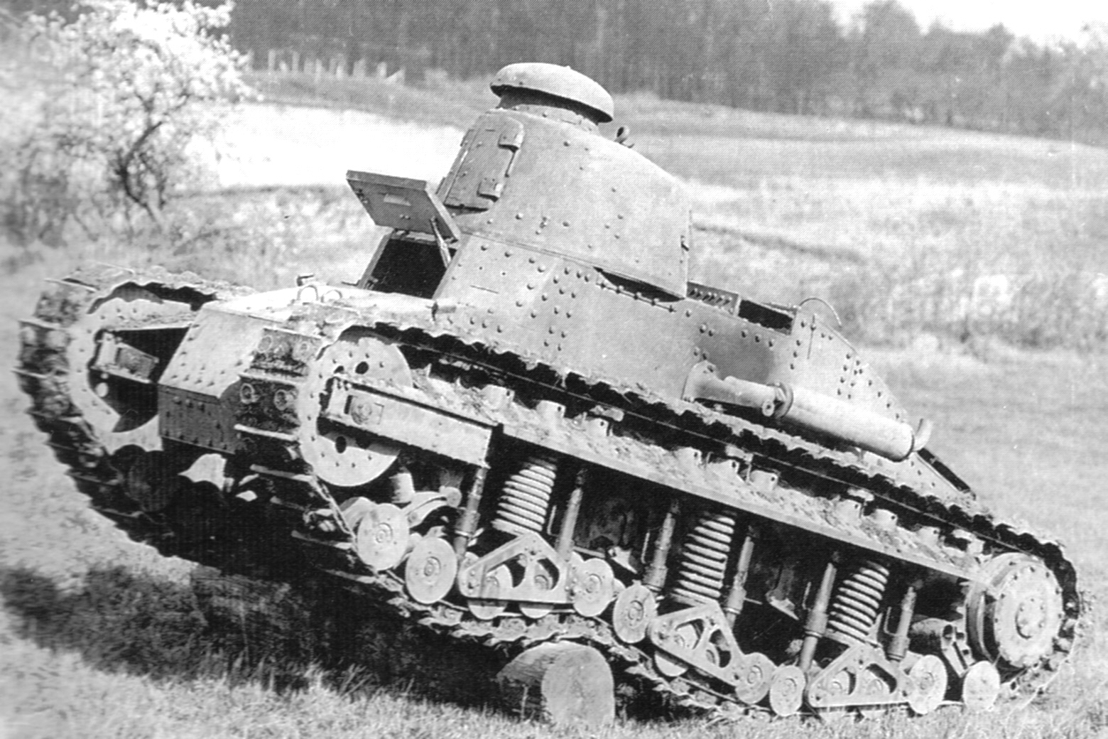 Digitale reproductie foto van het Renault NC1 tank prototype